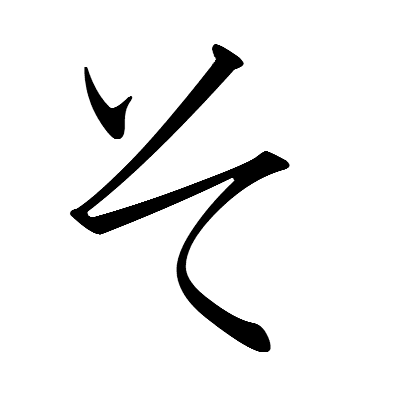 「そ」の上が離れていて1画多い字